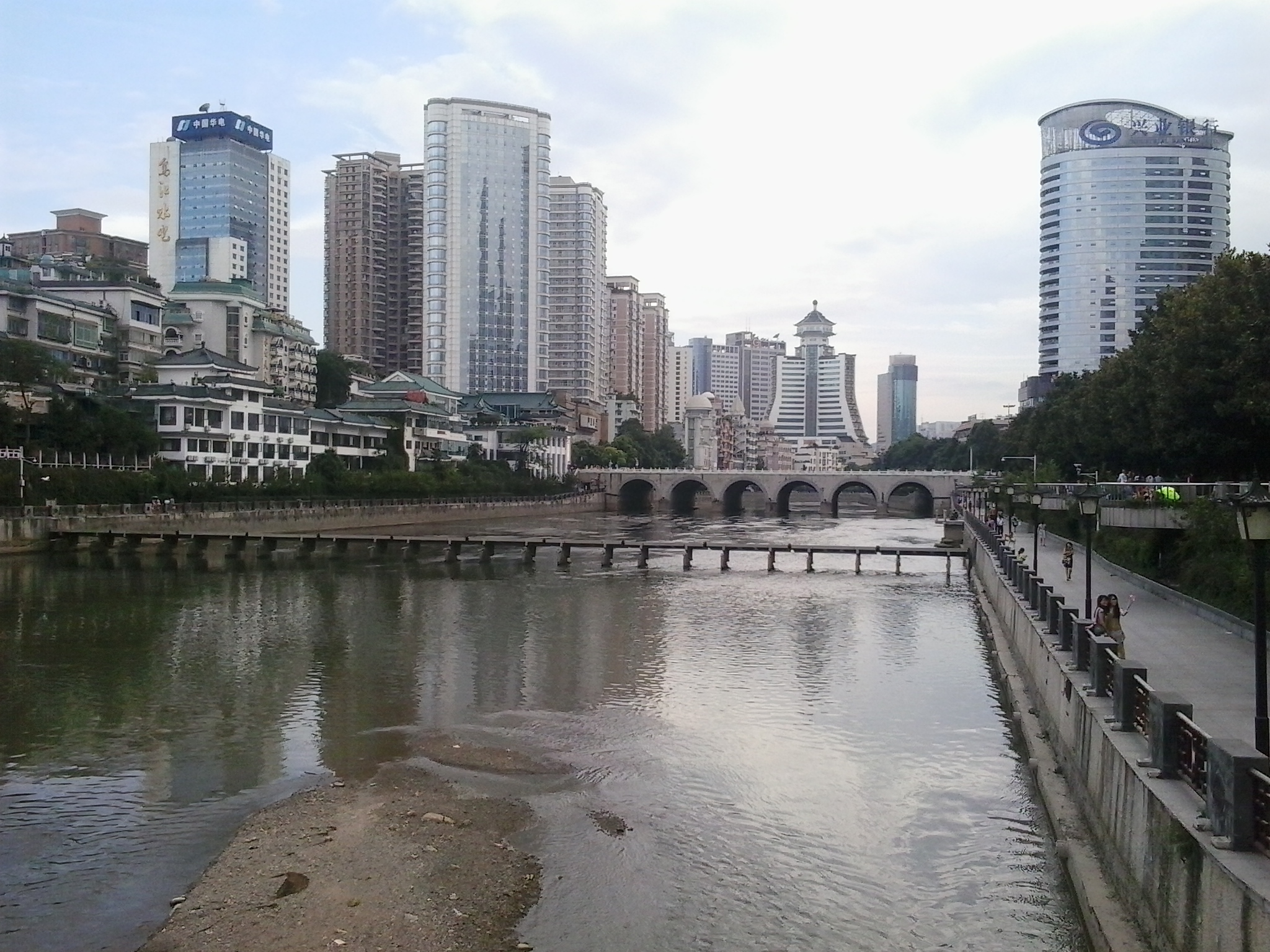 Guiyang, Guizhou / 贵州贵阳